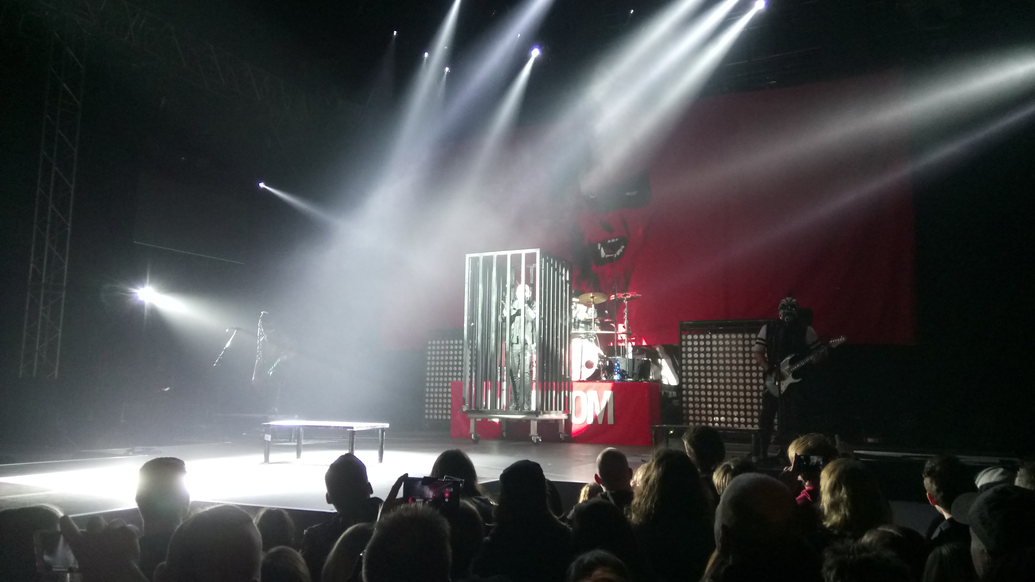 Hämatom - Megakoncert Monstrum kapely Dymytry (Praha, Malá sportovní hala, 23.3.2018)